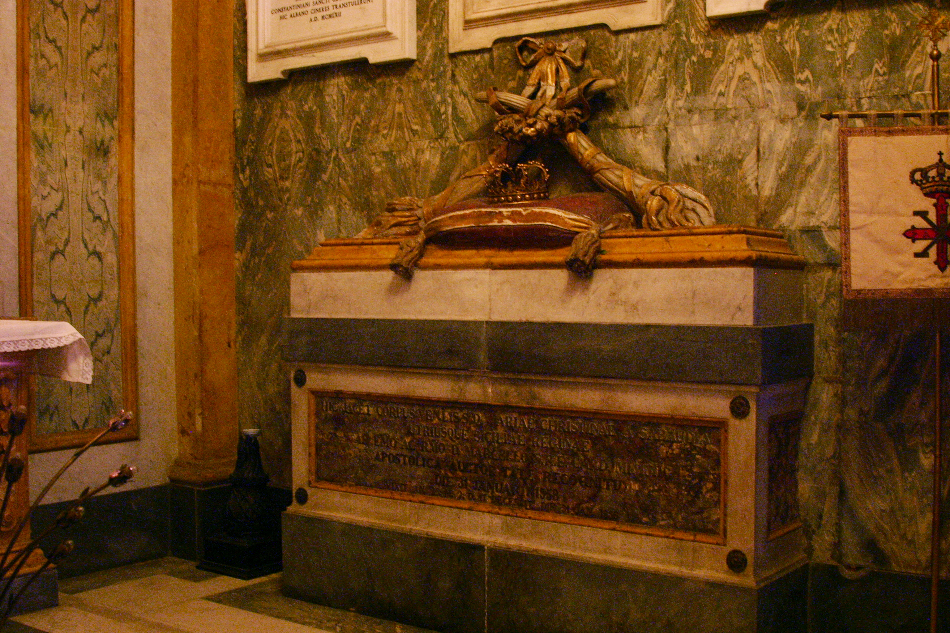 Santa Chiara - Naples